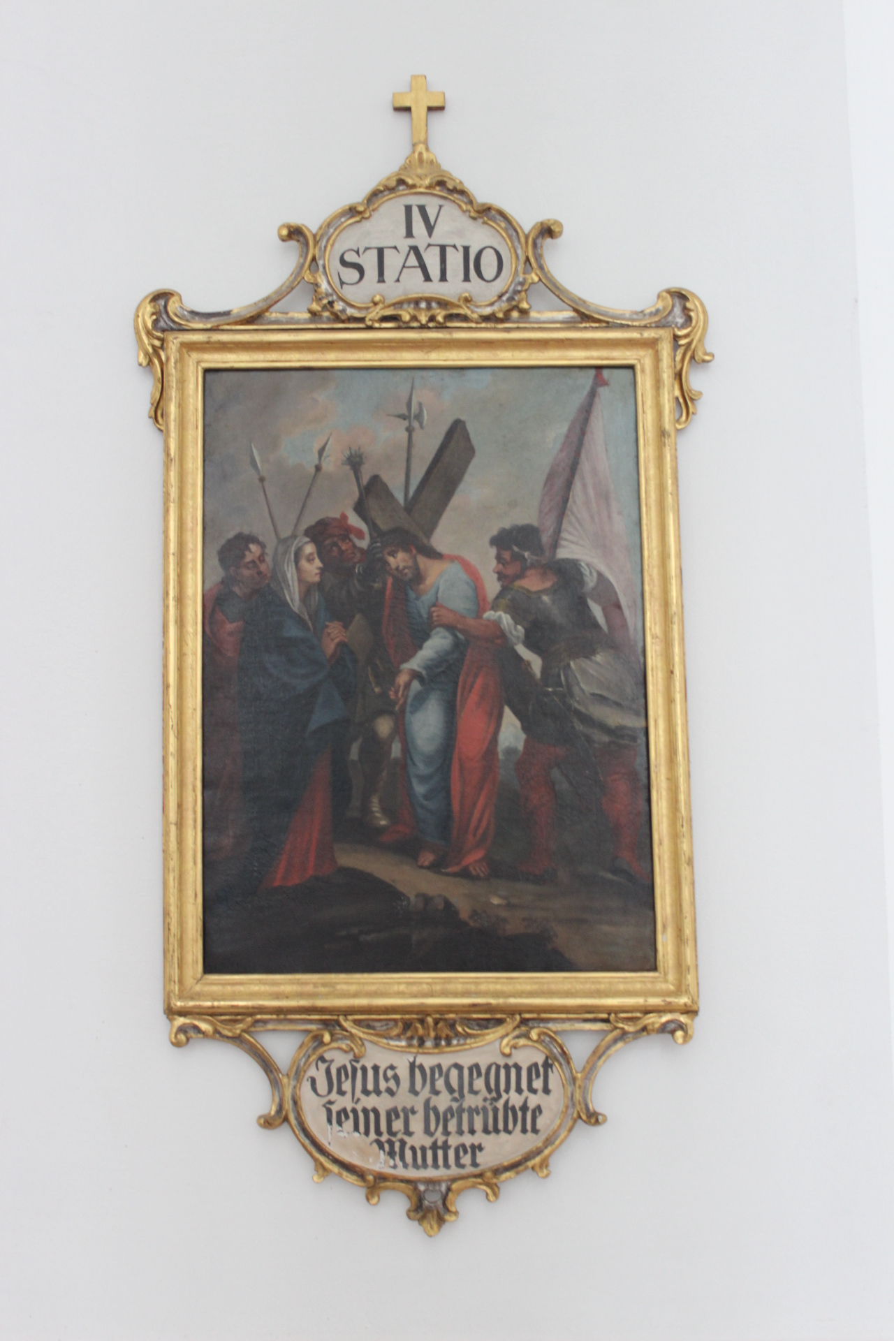 4. Station des Kreuzwegs der Heidelberger Jesuitenkirche